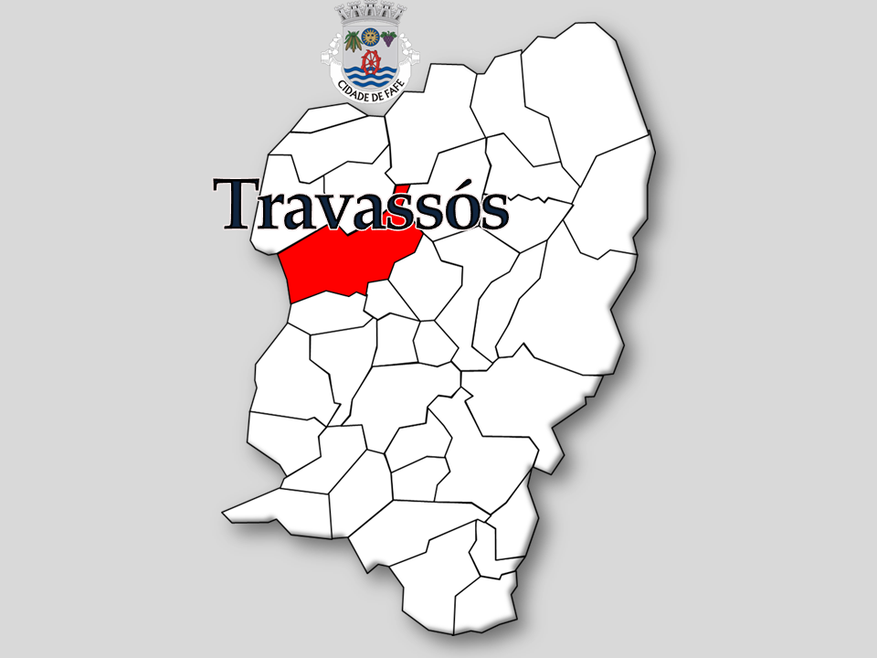 Censos 1864/2011